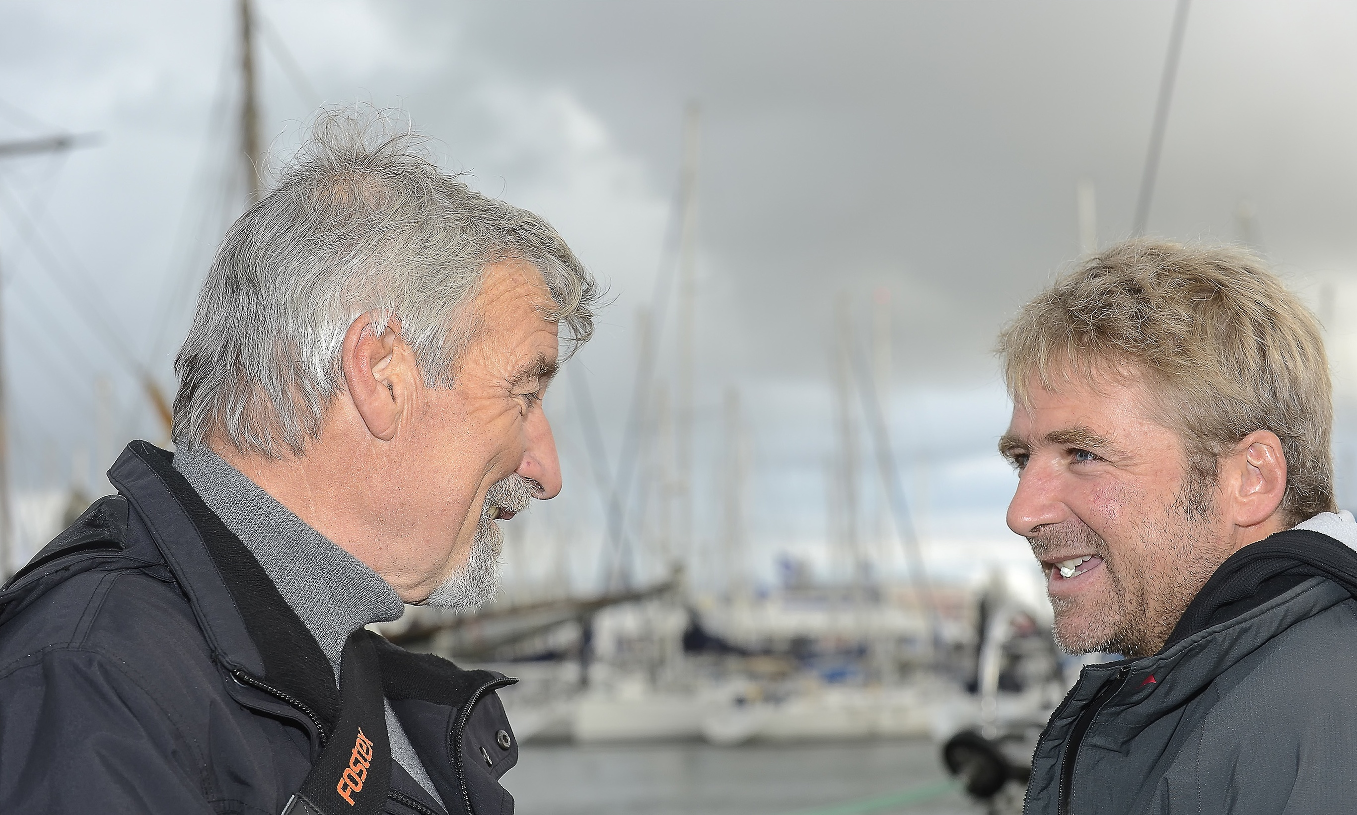 0191-Vendée 2012 (Ponton)